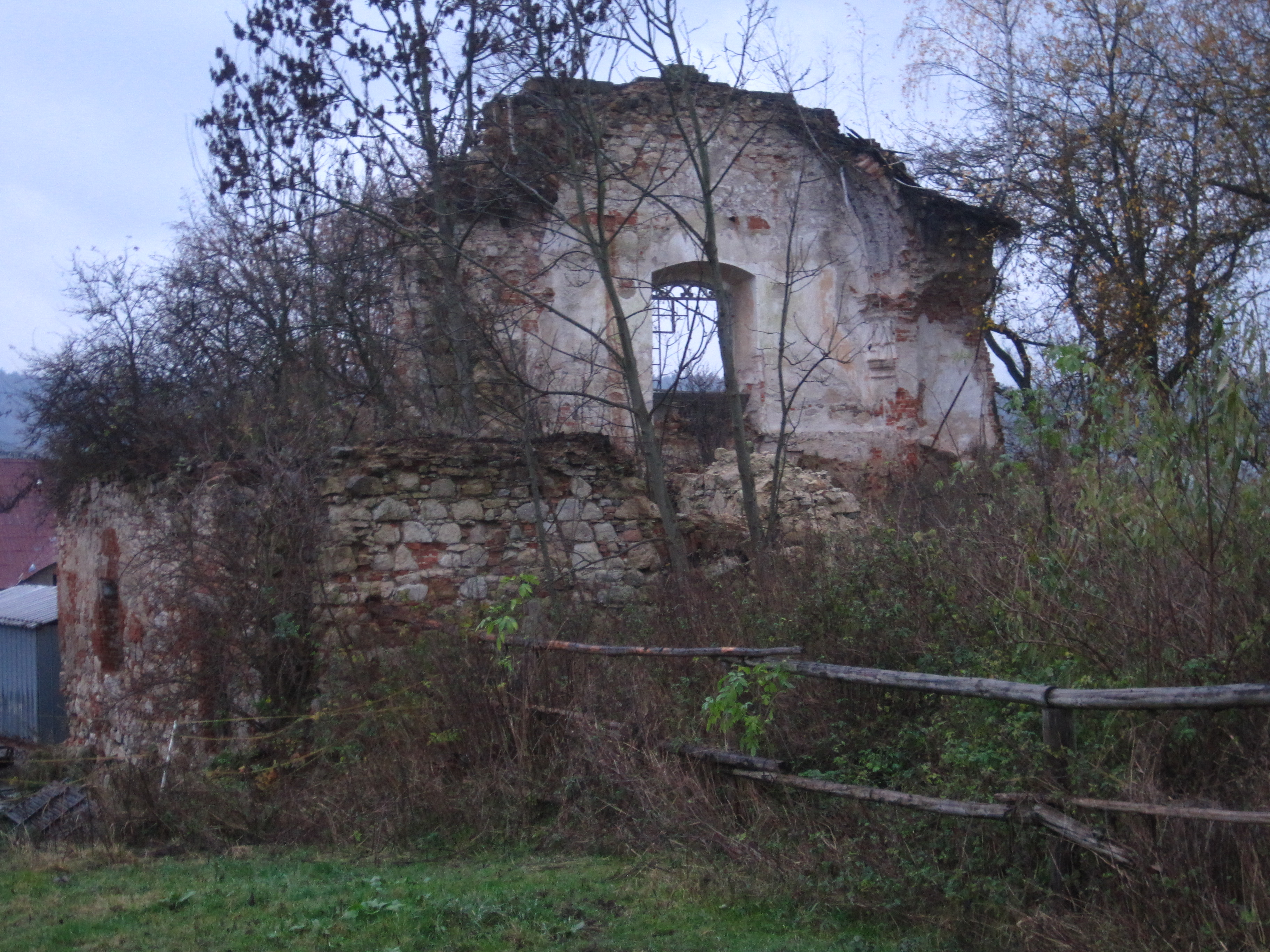 Kaple Anděla Strážce, parcely st. 2 a 4, Jílové (Hodkovice nad Mohelkou).